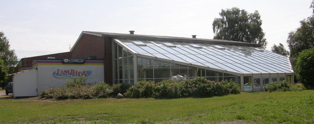 Das Schwimmbad Lambada